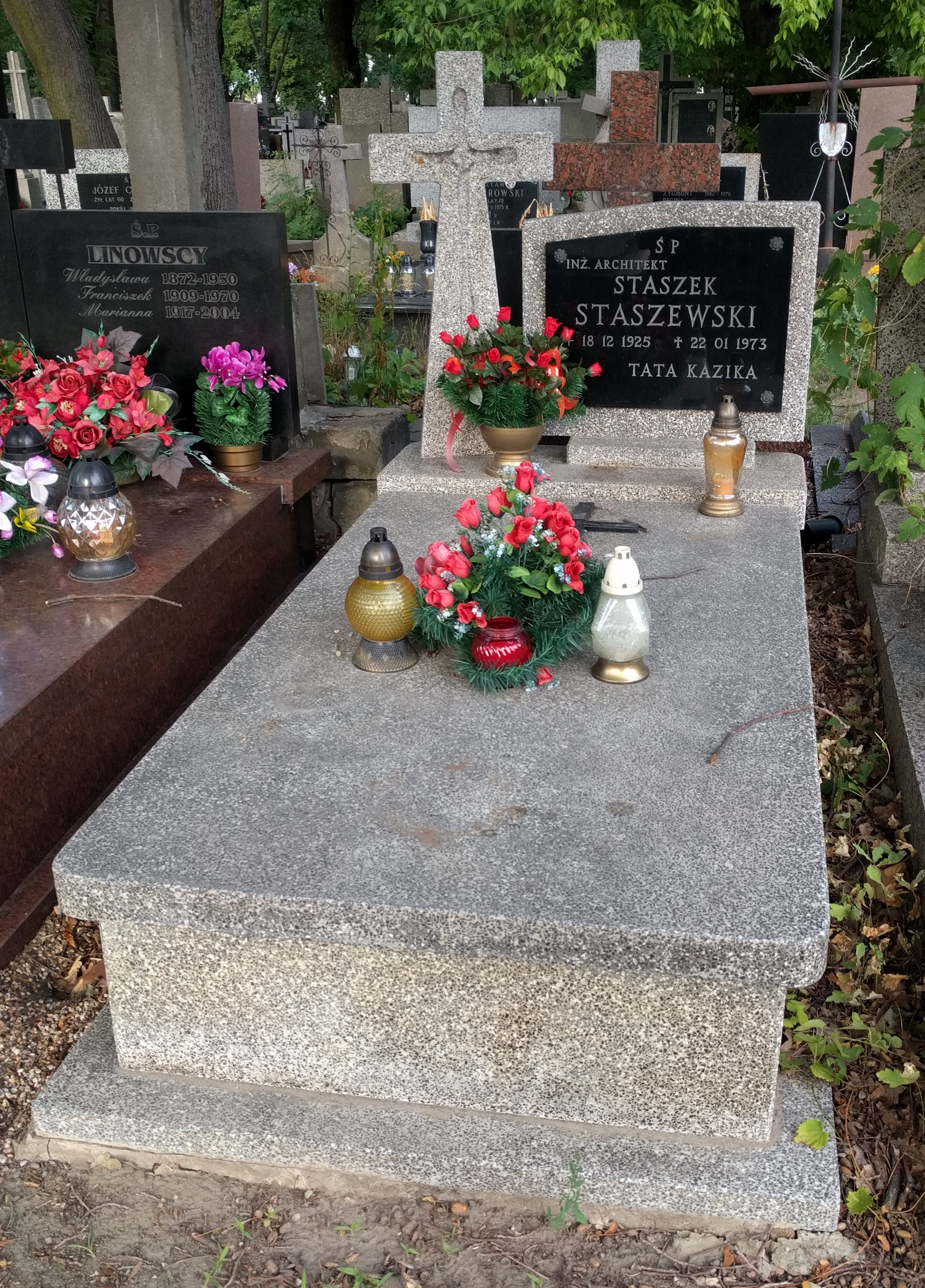 Nagrobek Stanisława Staszewskiego na Cmentarzu Bródnowskim w Warszawie